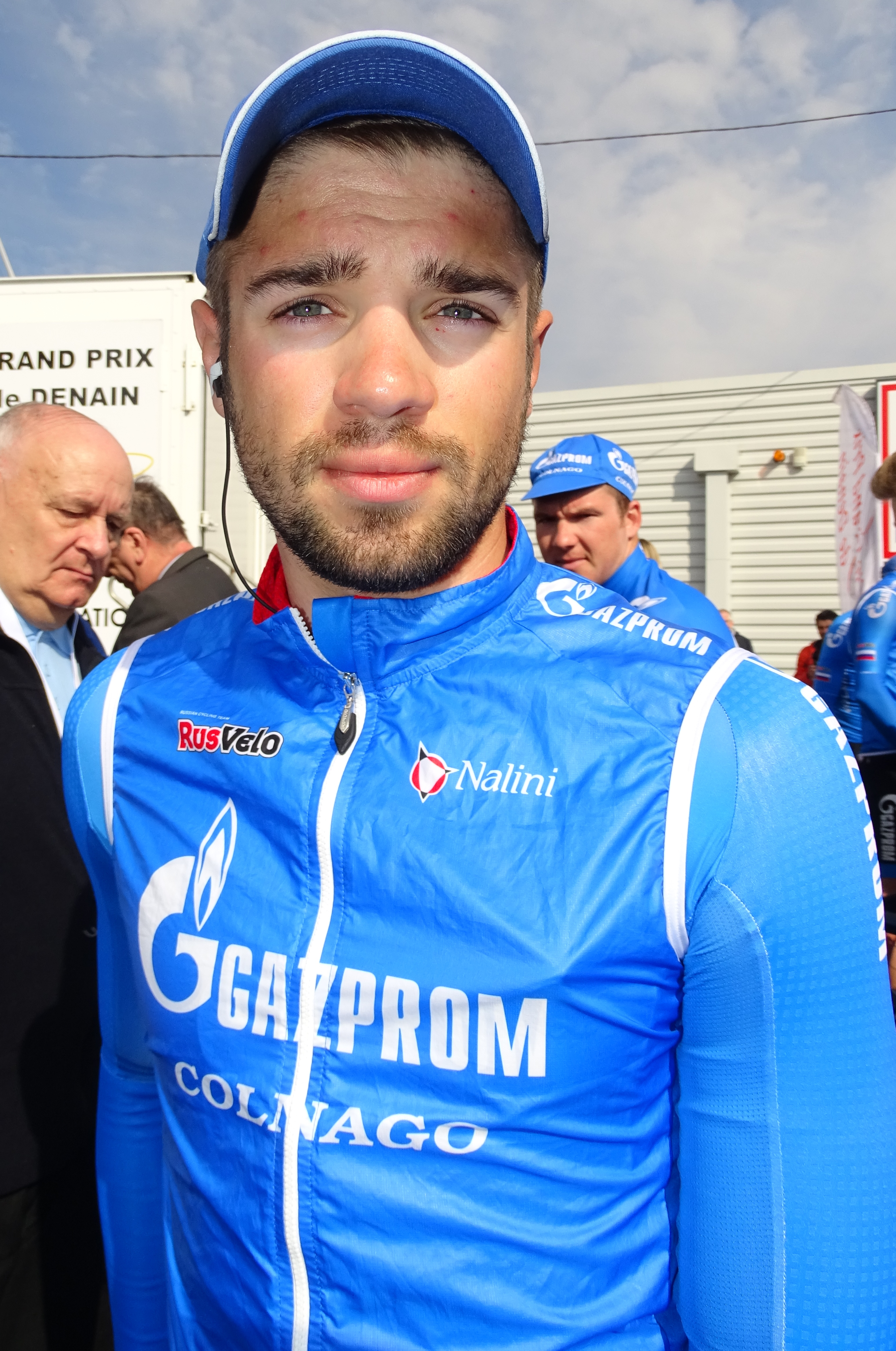 Reportage réalisé le jeudi 14 avril à l'occasion du départ et de l'arrivée du Grand Prix de Denain 2016 à Denain, Nord, Nord-Pas-de-Calais-Picardie, France.